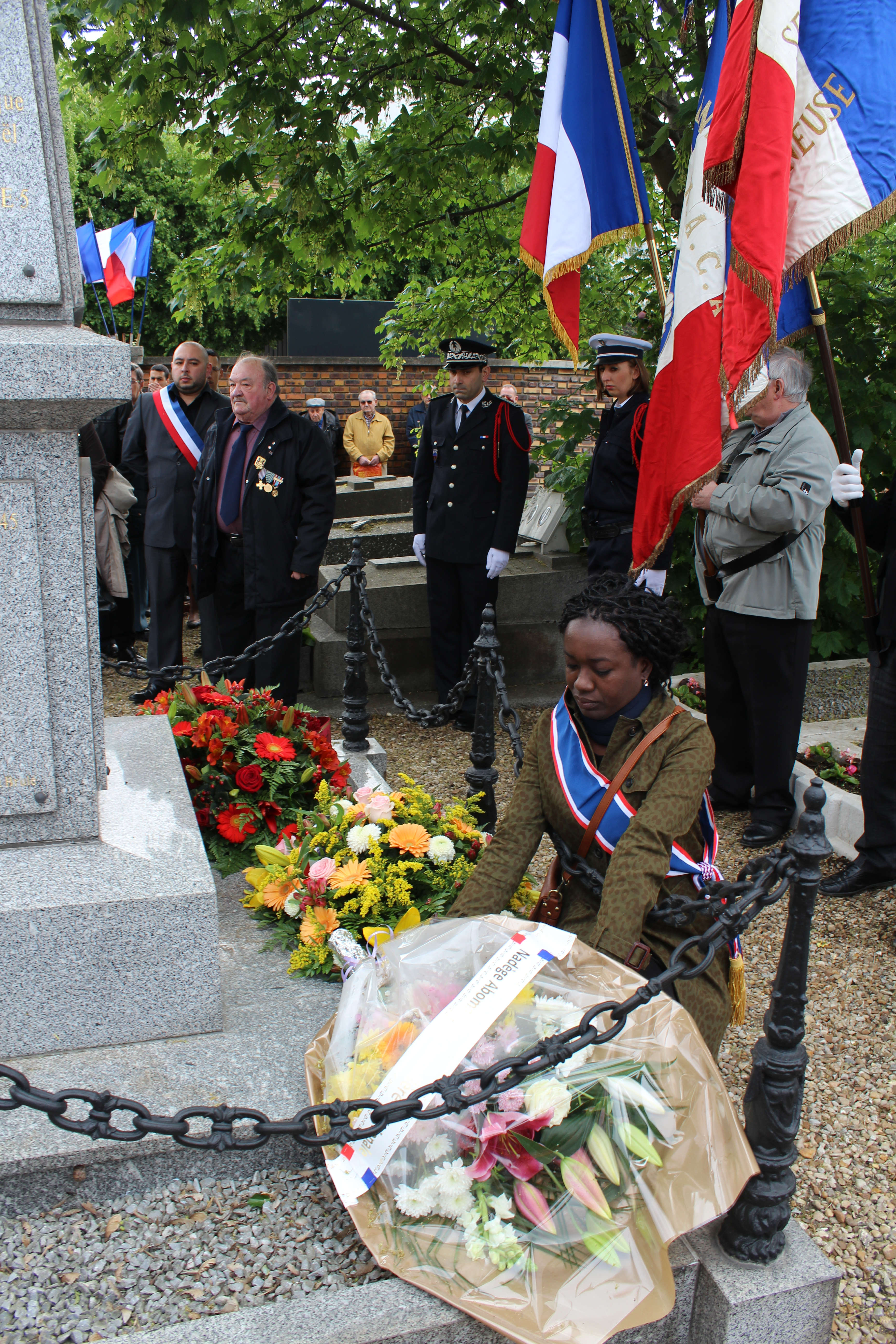 La conseillère régionale d'Île-de-France Nadège Abomangoli à la commémoration de la cérémonie du 8 mai 1945 à Villetaneuse le 8 mai 2014.